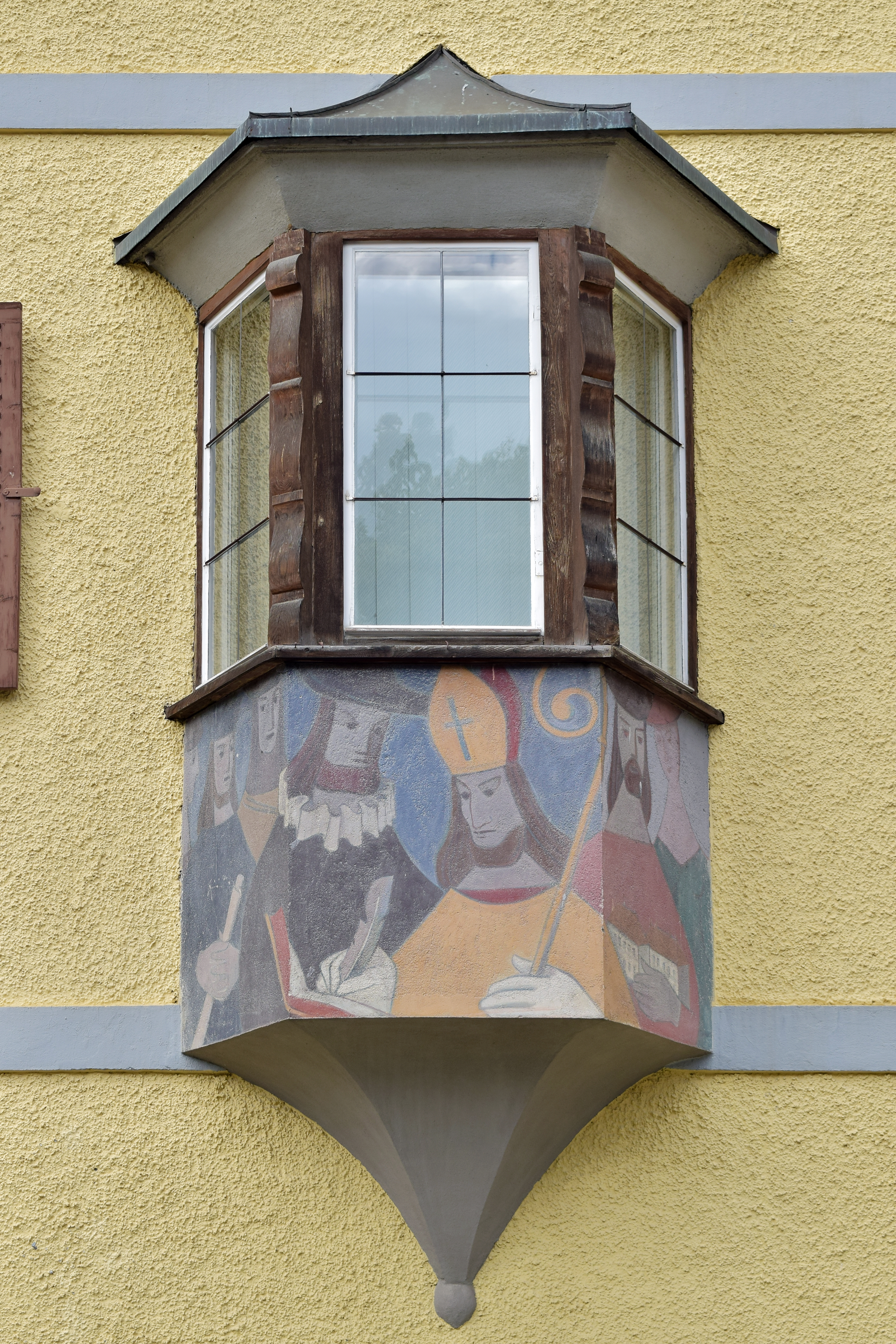 Das ehemalige Bezirksgericht ist heute Polizeistation. Die Malerei am Erker aus dem Jahr 1958 stammt von Franz Walchegger und trägt den Titel "Verpfändung Matreis an das Salzburger Domkapitel". This media shows the remarkable cultural object in the Austrian state of Tyrol listed by the Tyrolean Art Cadastre with the ID 17047. (on tirisMaps, pdf, more images on Commons, Wikidata)